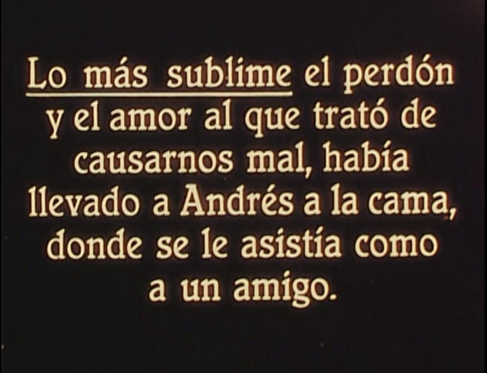 Lo más sublime, film mut del 1927, amb intertítols en castellà